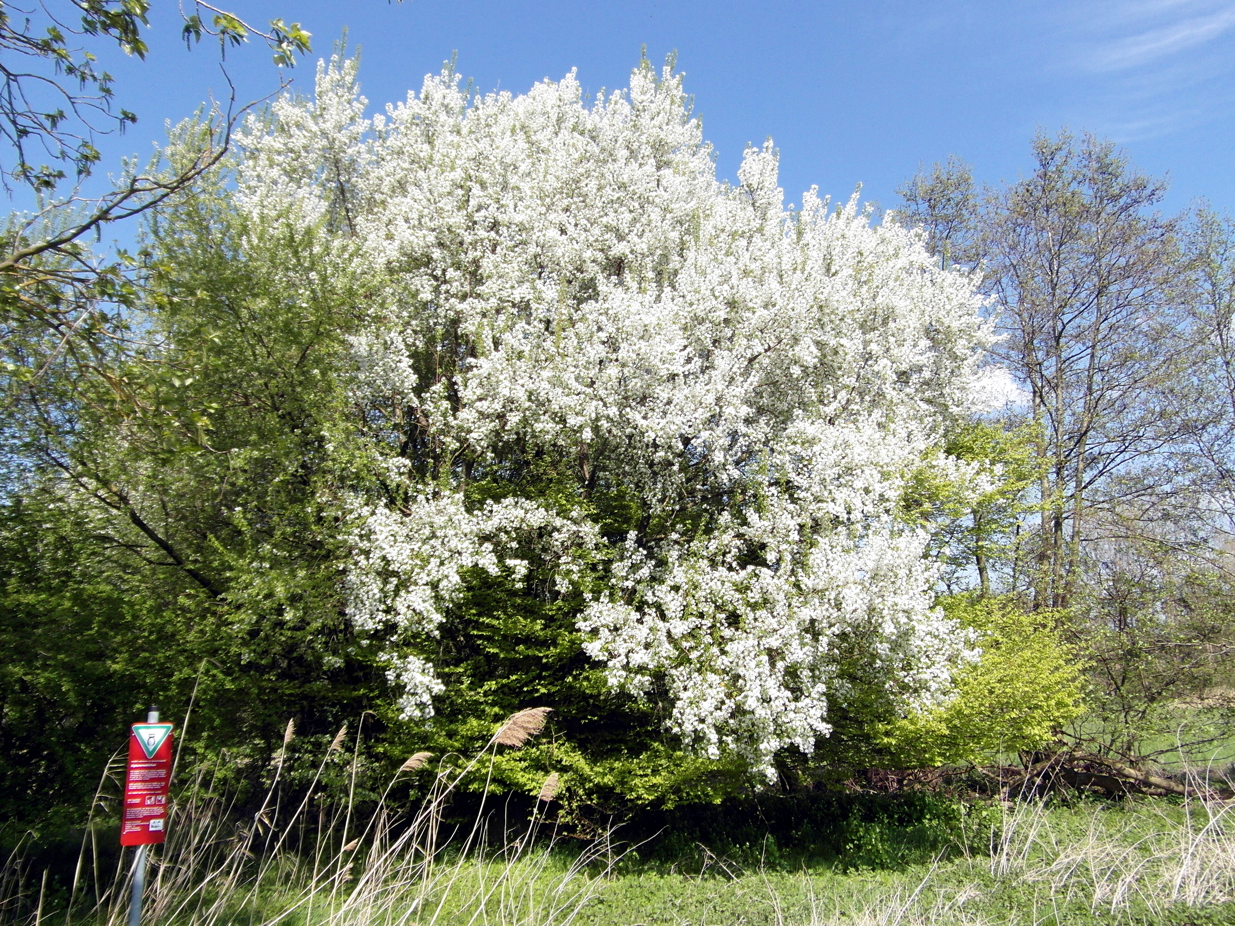 Das Zigeunerwäldchen ist ein Naturschutzgebiet im Gebiet der Stadt Springe in der Region Hannover in Niedersachsen. (NSG HA 115)